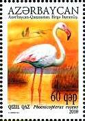 Qızıl qaz